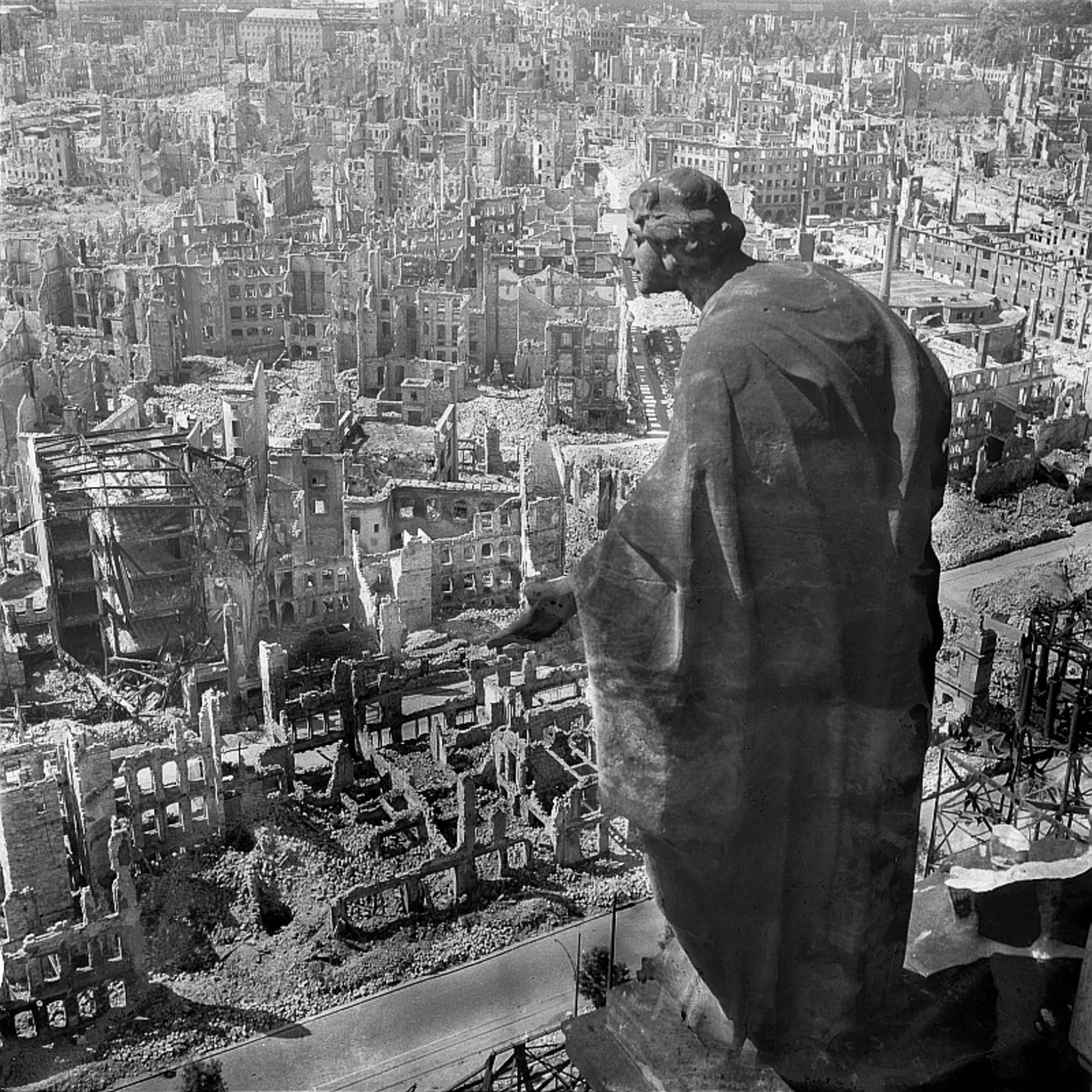 Original image description from the Deutsche FotothekDresden. Blick vom Rathausturm nach Süden mit der Allegorie der Güte (auch: Bonitas; Skulptur von August Schreitmüller, entstanden 1908/1910), Aufnahme 1945